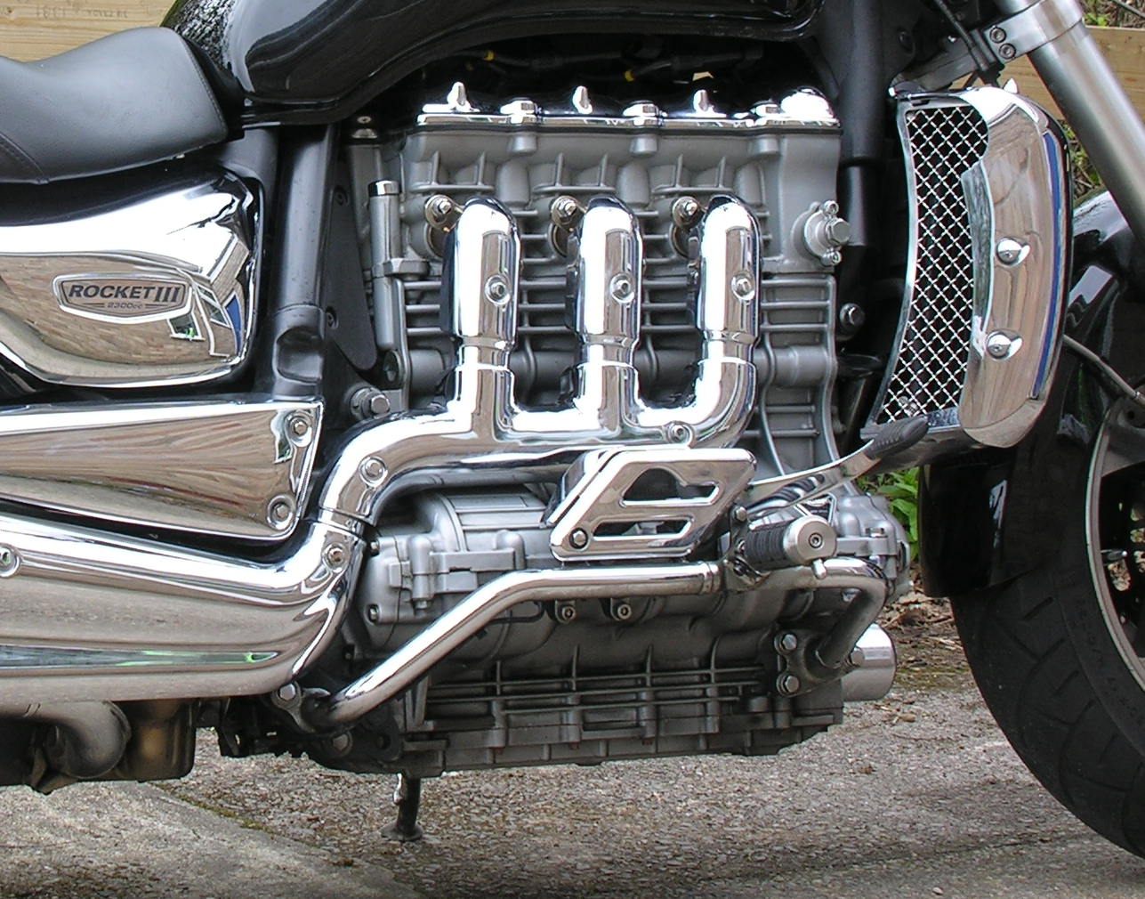 Triumph Rocket III engine